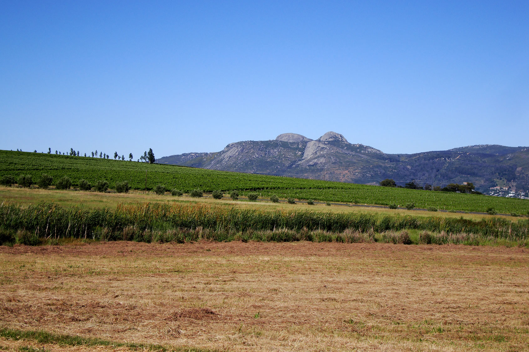 Vignoble de Paarl Afrique du Sud